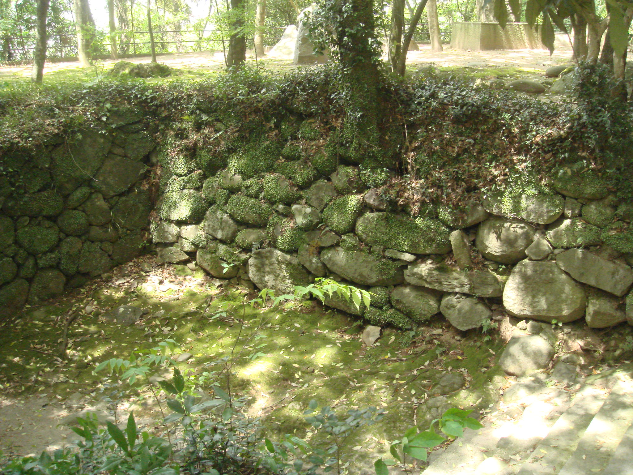 豊後日隈城の大手虎口跡と伝えられている枡形石垣。同城郭跡で最も遺構を残す箇所である。